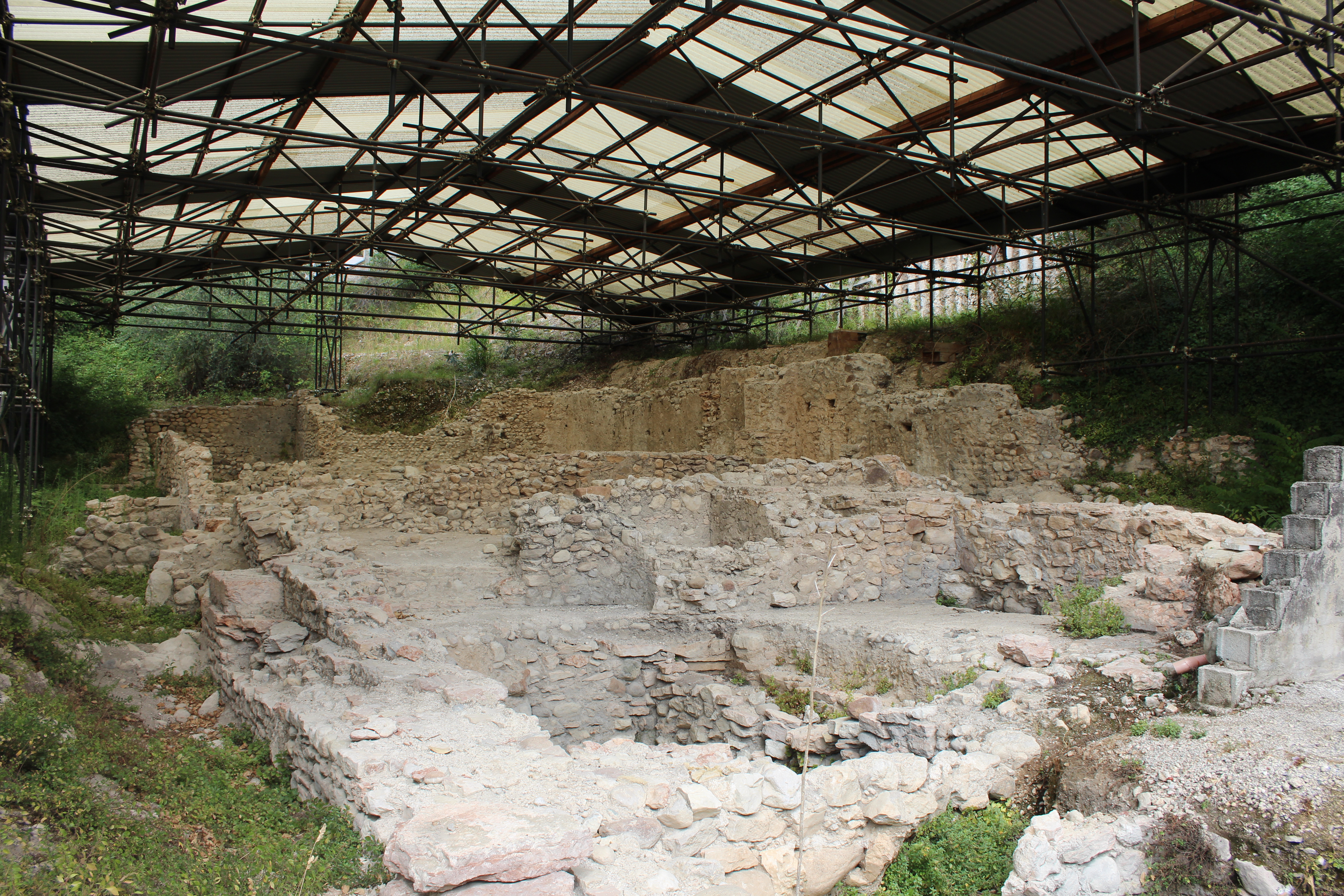 Scavi archeologici della villa romana di Brenzone sul Garda, provincia di Verona